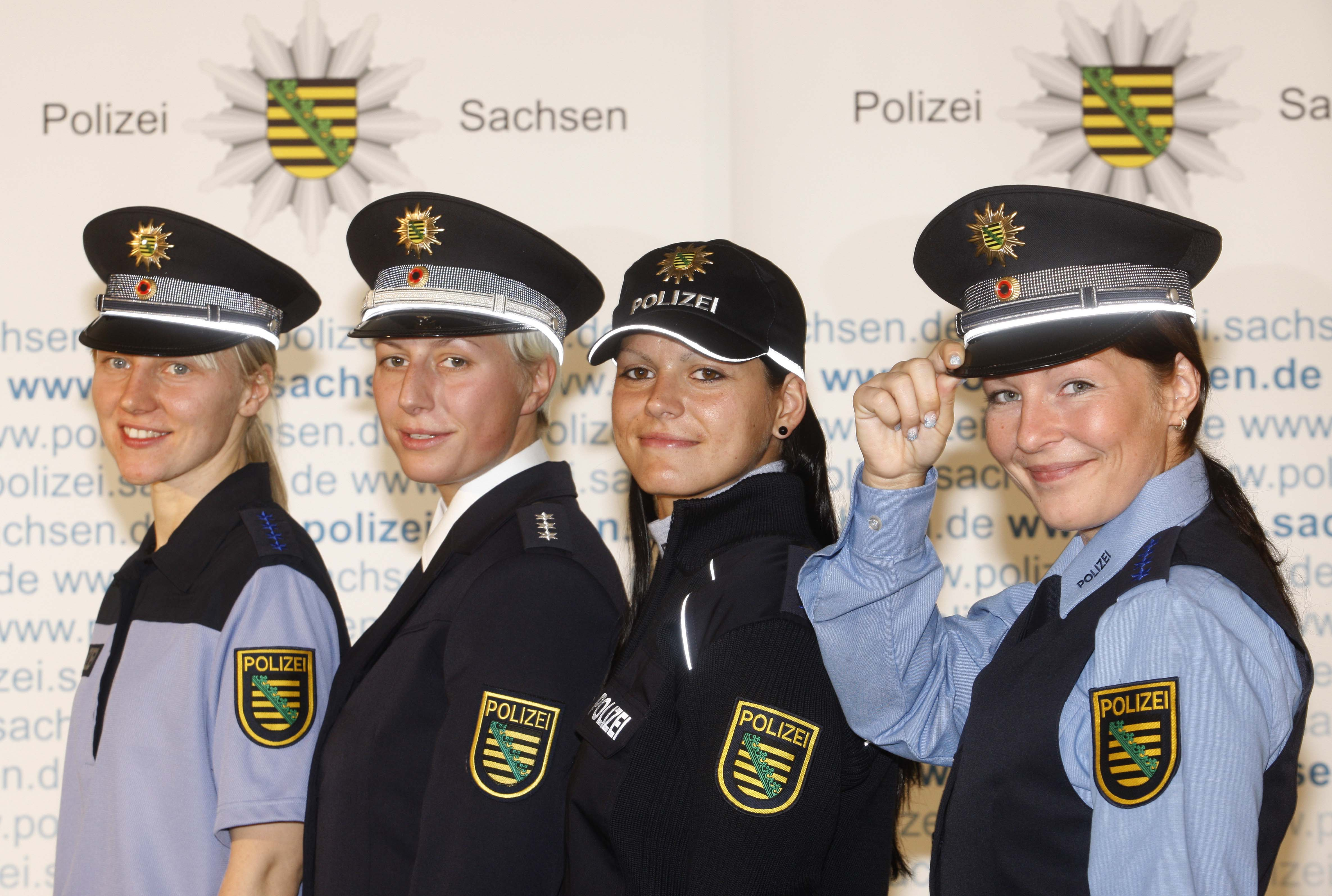 Neue blaue Uniform der Polizeien der Länder Berlin, Brandenburg und Sachsen